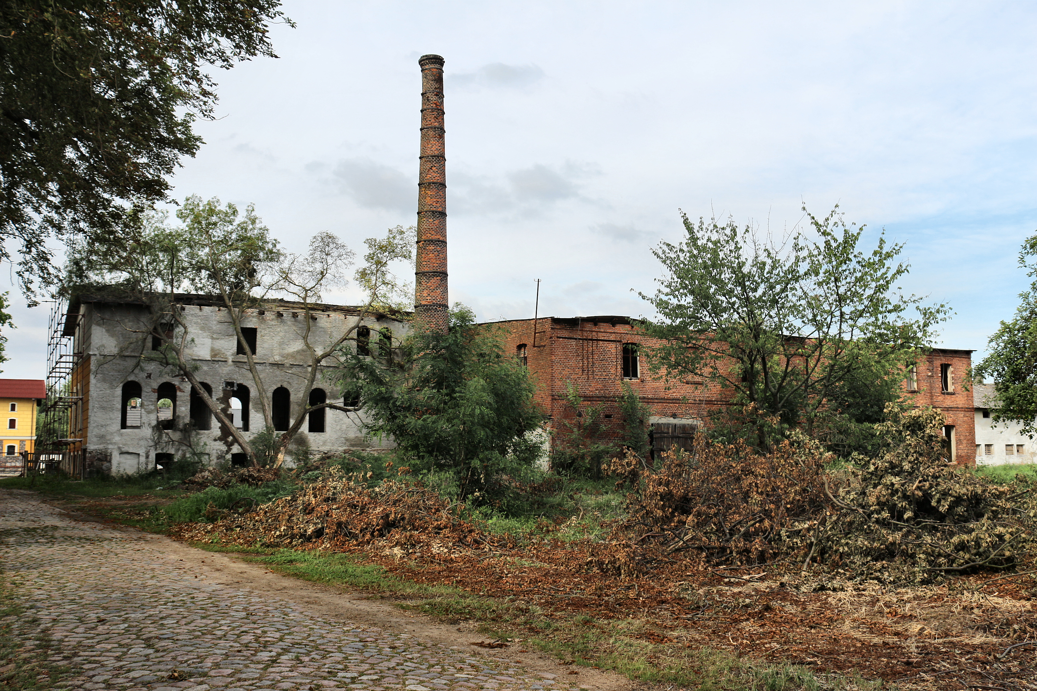 Dębowa Łęka, stodoła folwarczna II, 1910